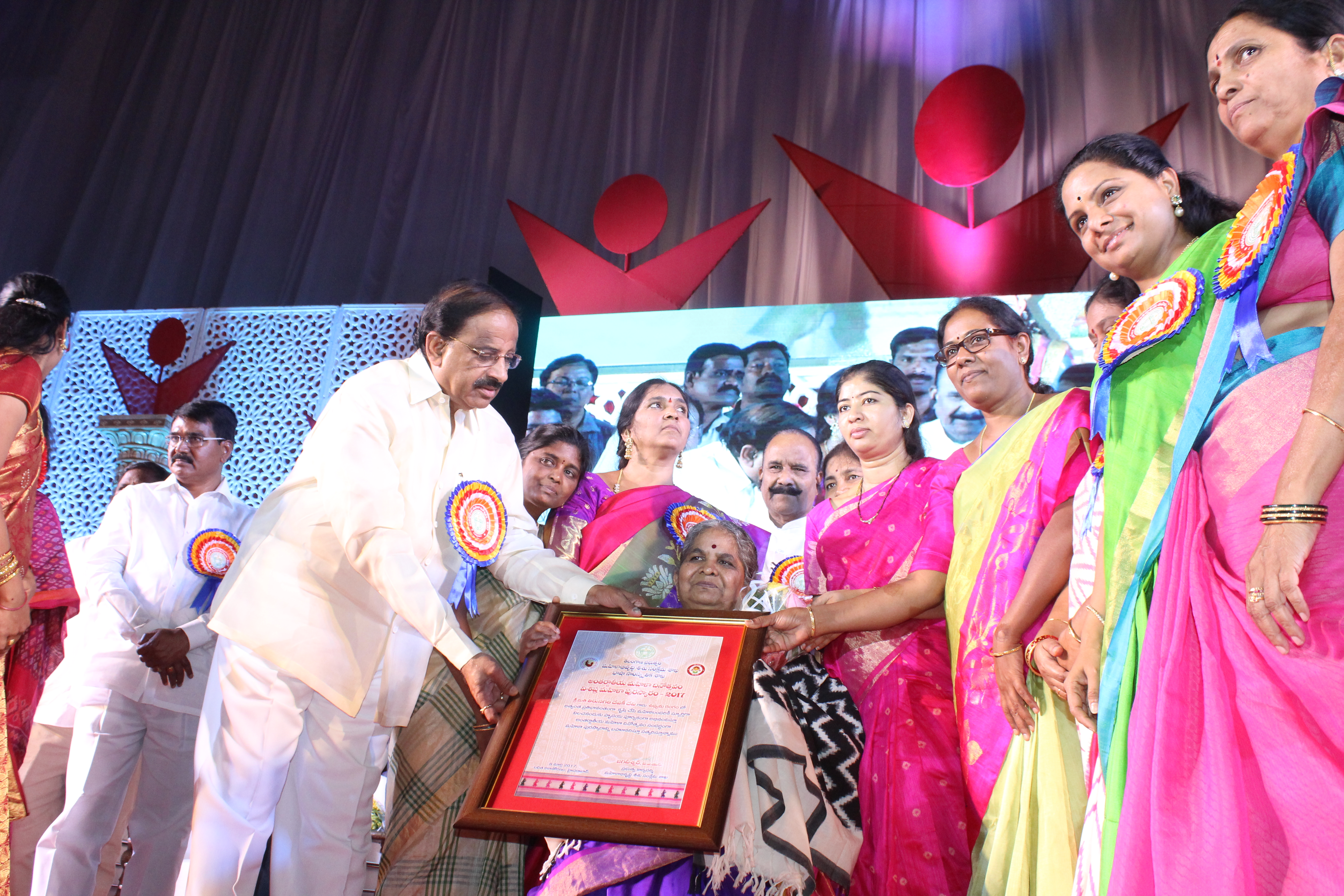 తెలంగాణ రాష్ట్ర విశిష్ట మహిళా పురస్కారం అందుకుంటున్న తిరునగరి దేవకీదేవి